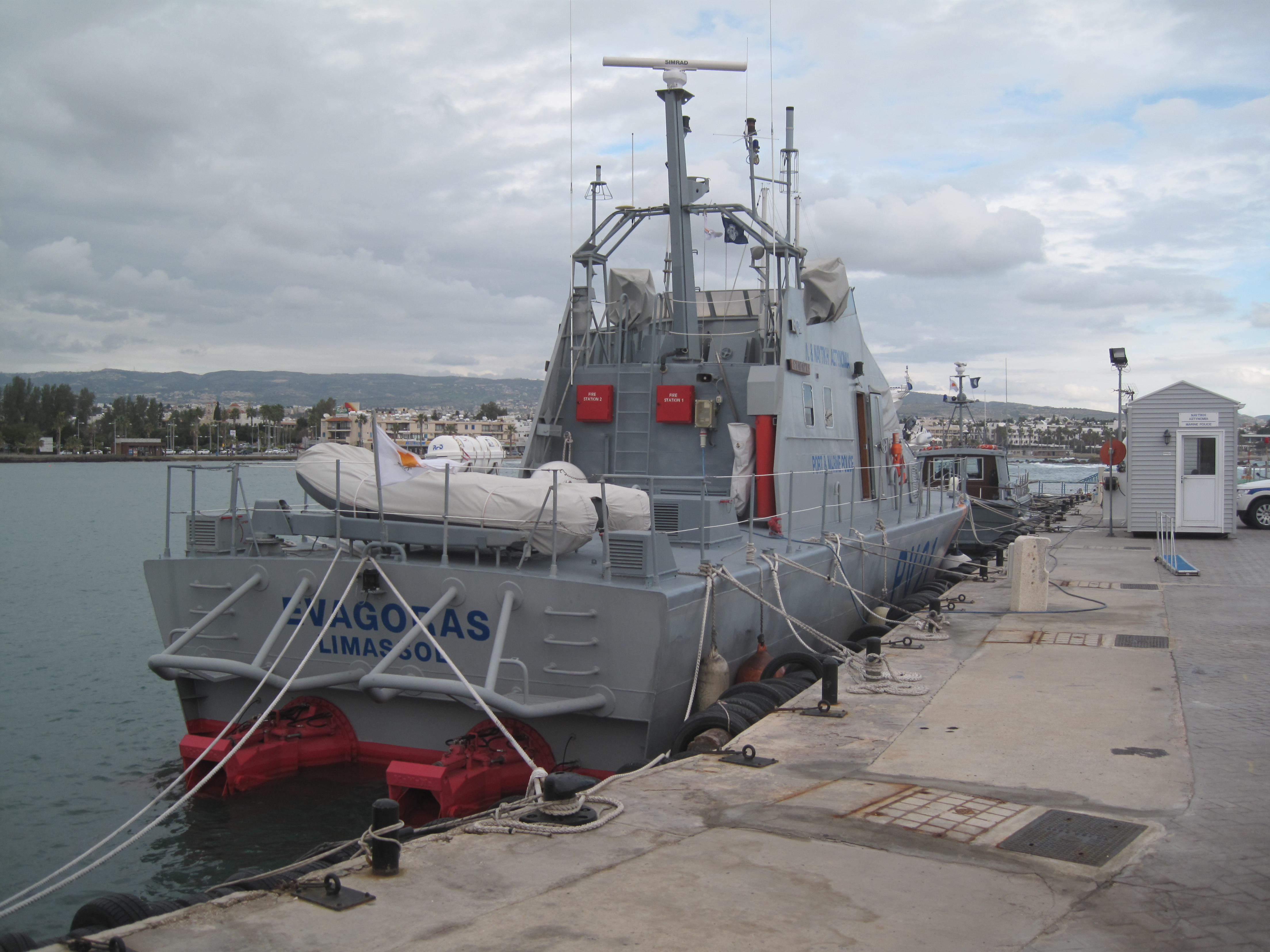 politieboot van Cyprus